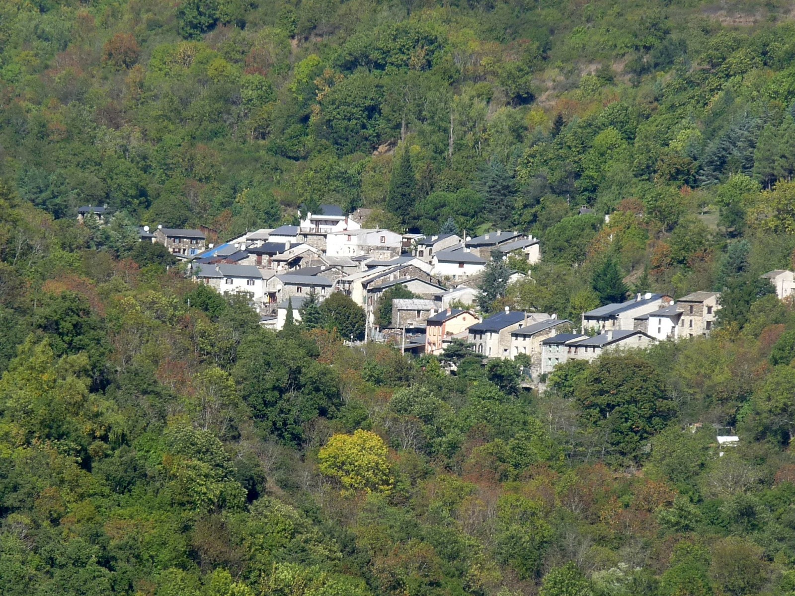 Urbanya, Pyrénées-Orientales, France